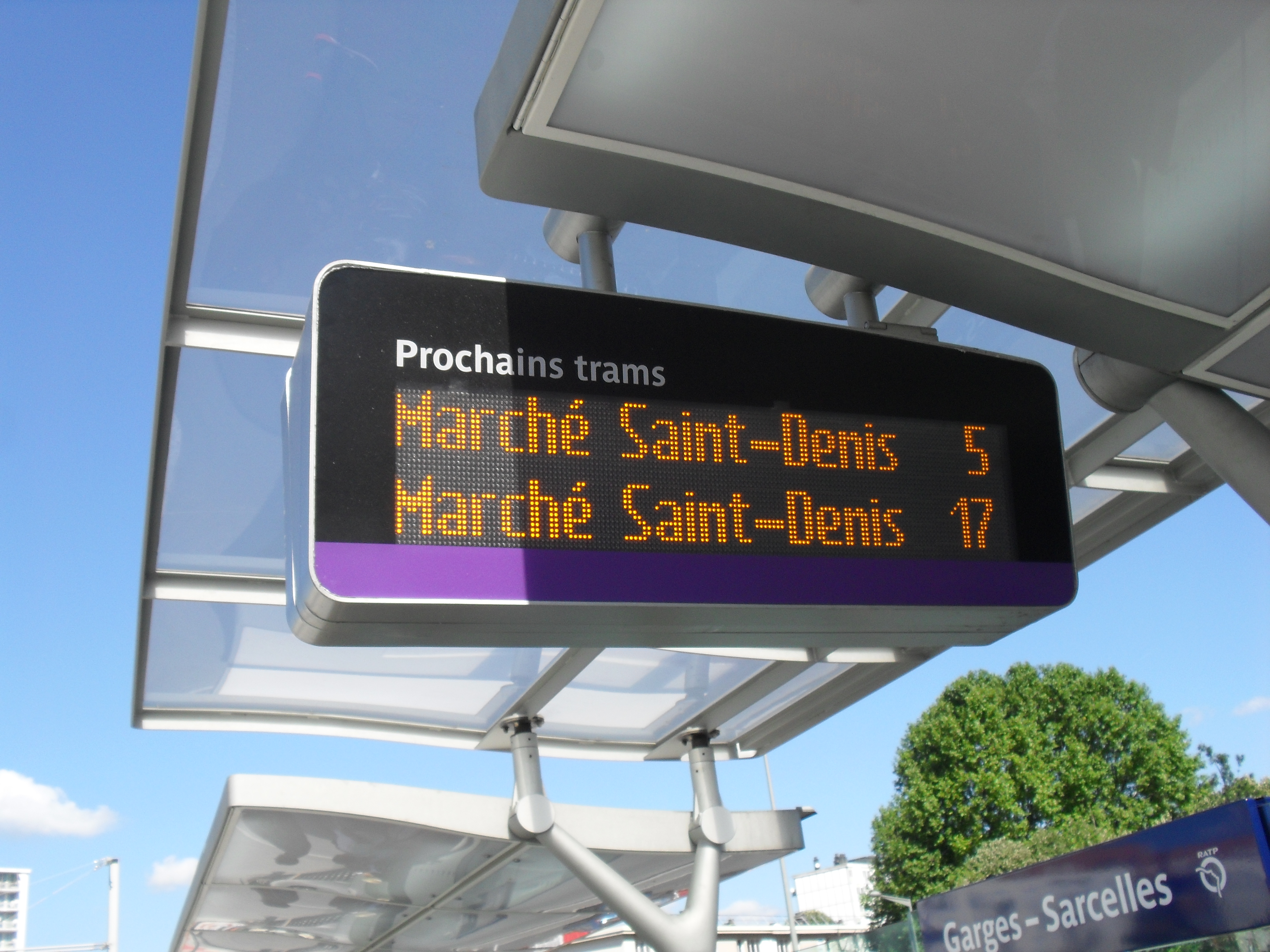 Une borne SIEL à la station T5 "Garges-Sarcelles".